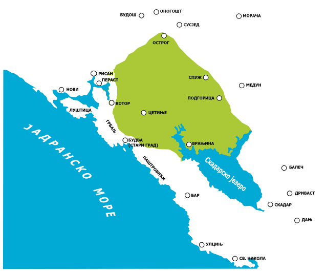 Горња Зета у 15. вијеку.